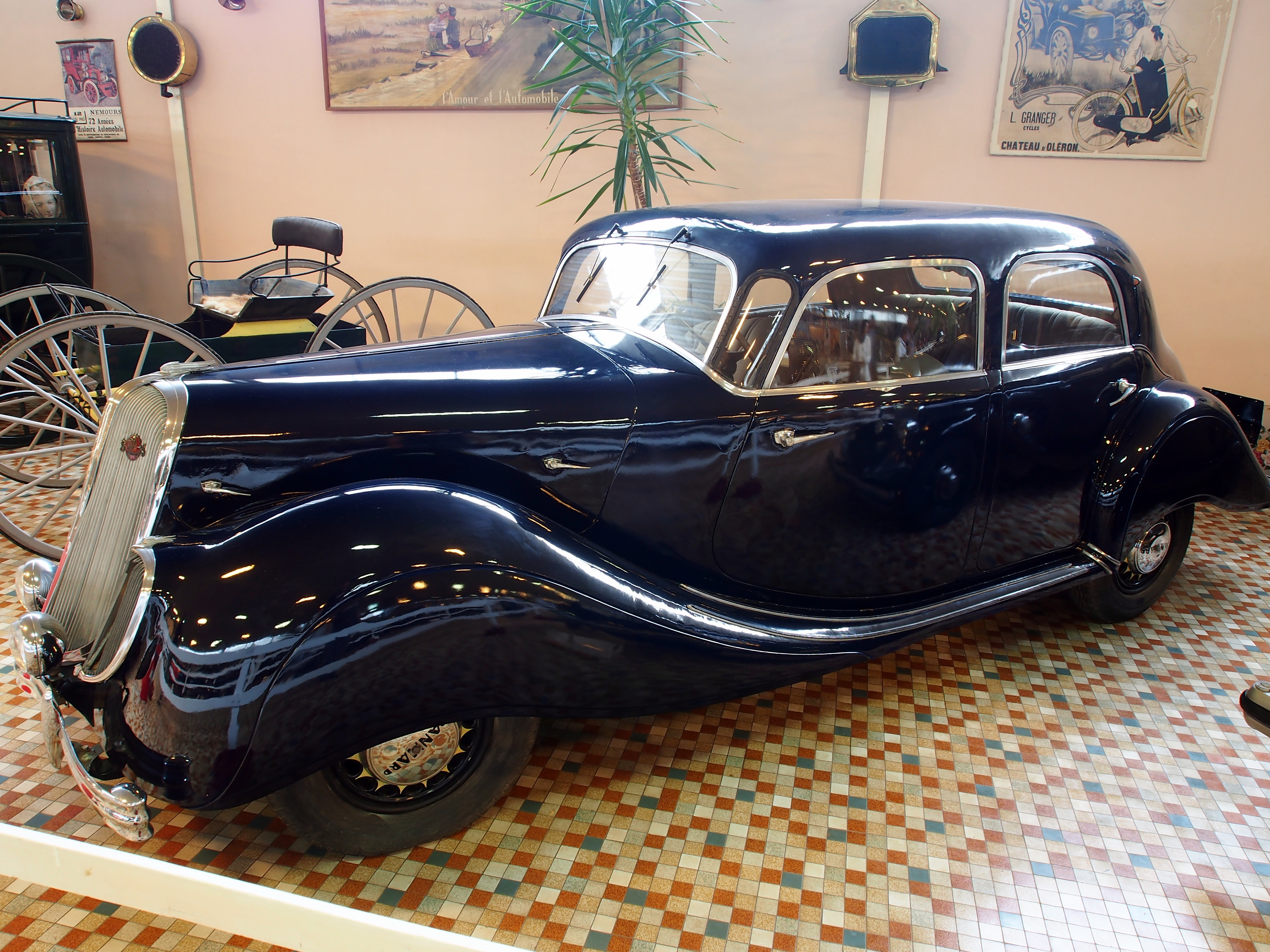 Photographed at the Musée Automobile de Vendée, France.